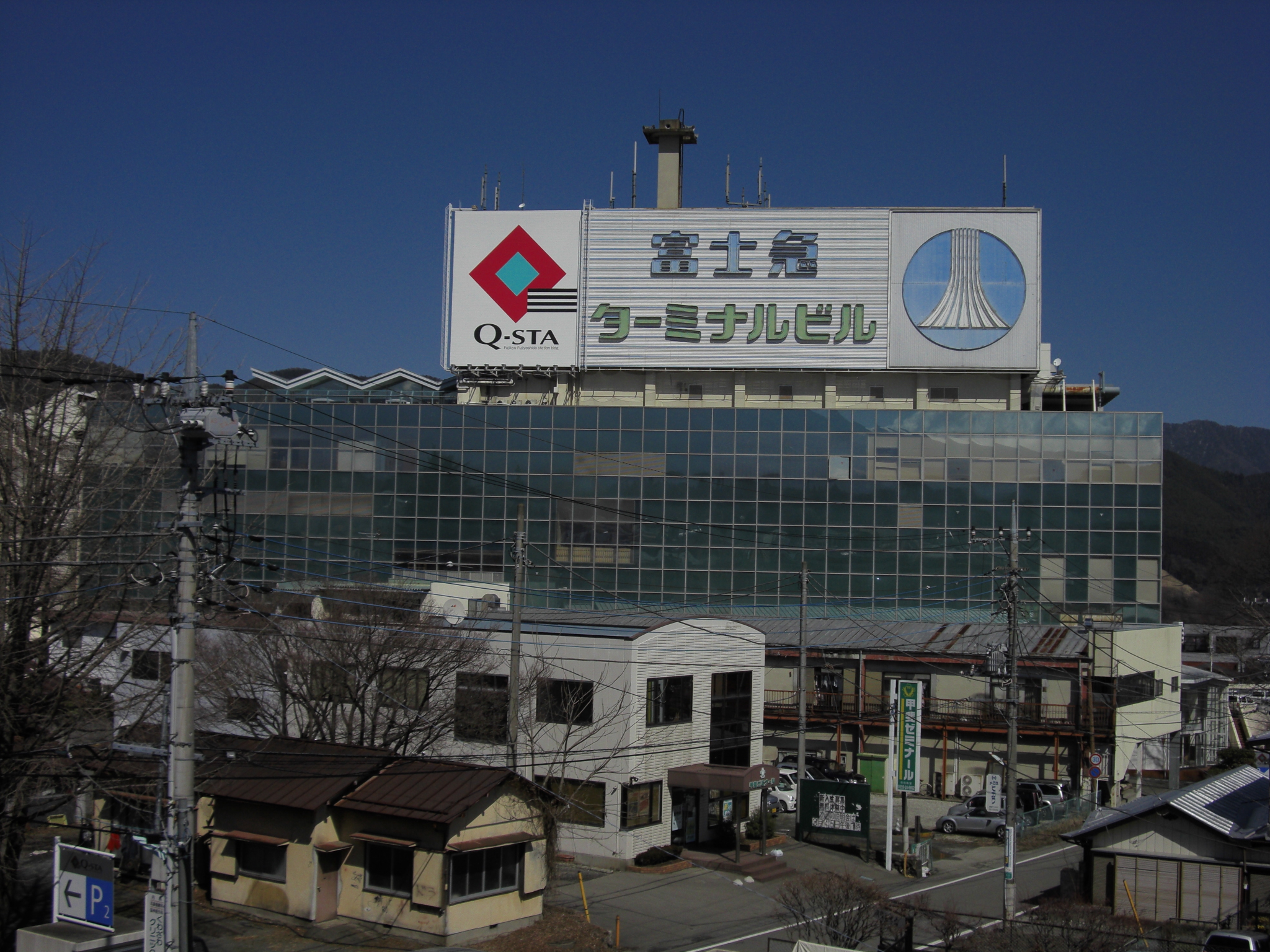 Q-STAを看板がよく見える場所（南側）から撮影。